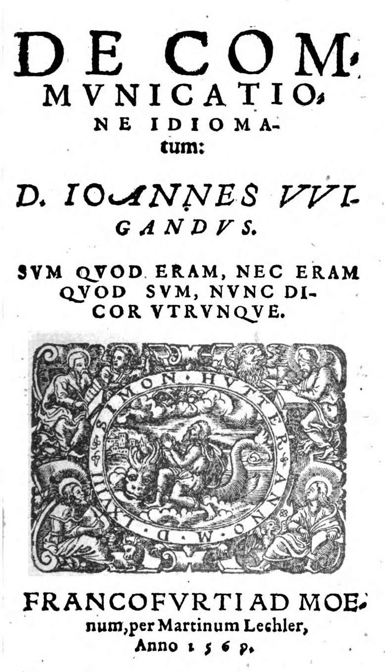 Johannes Wigand: De communicatione idiomatum, Frankfurt a.M. 1569 Titelblatt, mit dem Motto SVM QVOD ERAM, NEC ERAM QVOD SVM, NVNC DICOR VTRVNQVE - "Ich bin, was ich war [Gott], war aber nicht, was ich bin [Mensch], nun heiße ich beides".